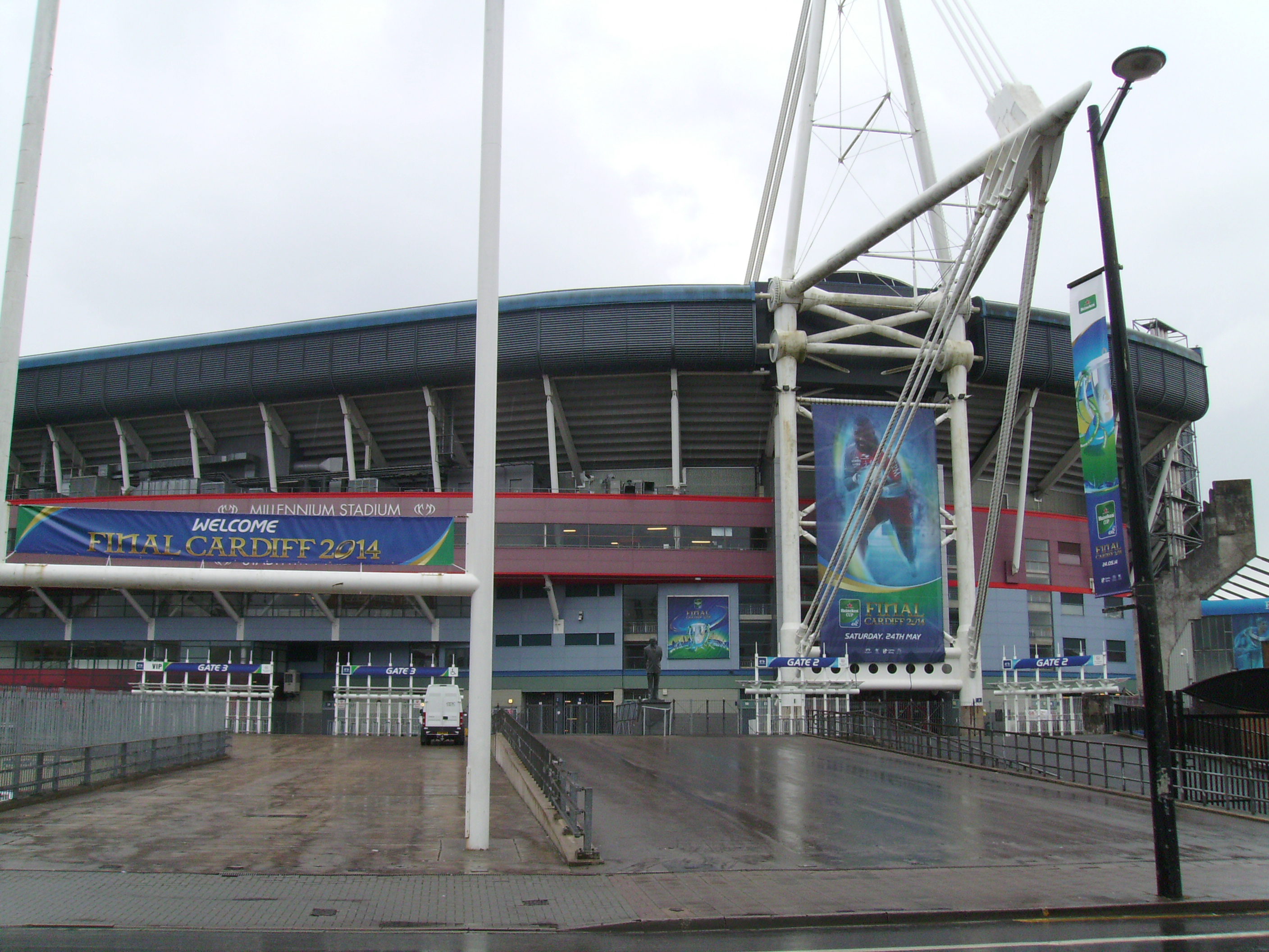 Millennium Stadium, Westgate Street, Cardiff, Wales. During Finals Weekend (2014 Heineken Cup Final)